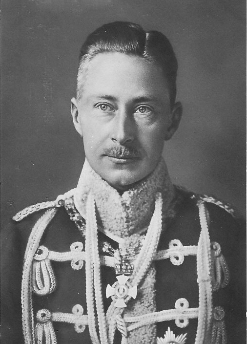 Kronprinz Wilhelm, Ausschnitt aus einem Familienportrait.